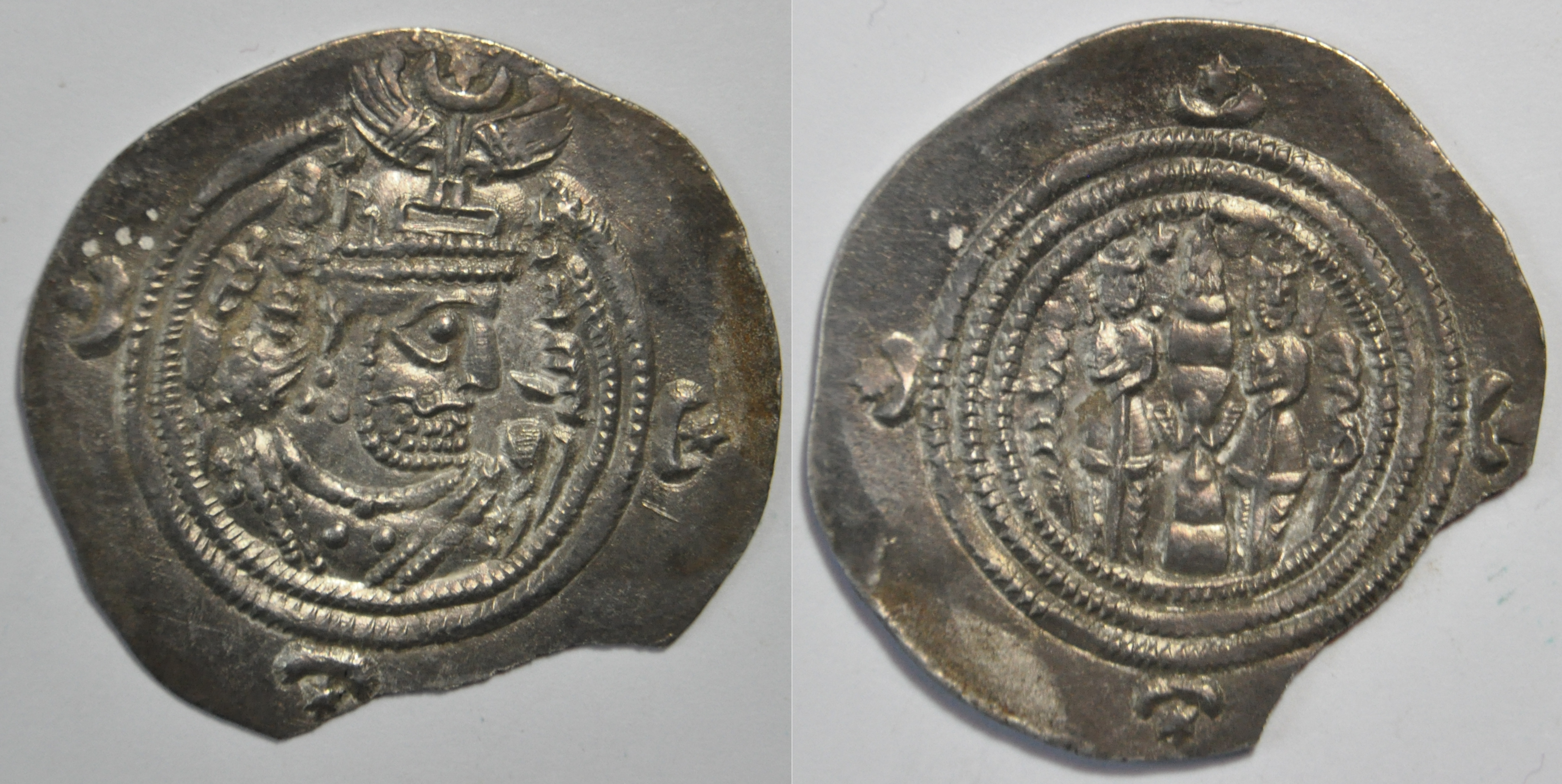 Une monnaie d'une drachme en argent de Khosro II (590-628) de la dynastie sassanide (226-650) émise à Ahmatana (Hamadan, Iran) durant l'année 34 (625). Dimension : 32 mm Poids : 4 g. Référence : Mitchiner ACW 1179, Göbl II/3